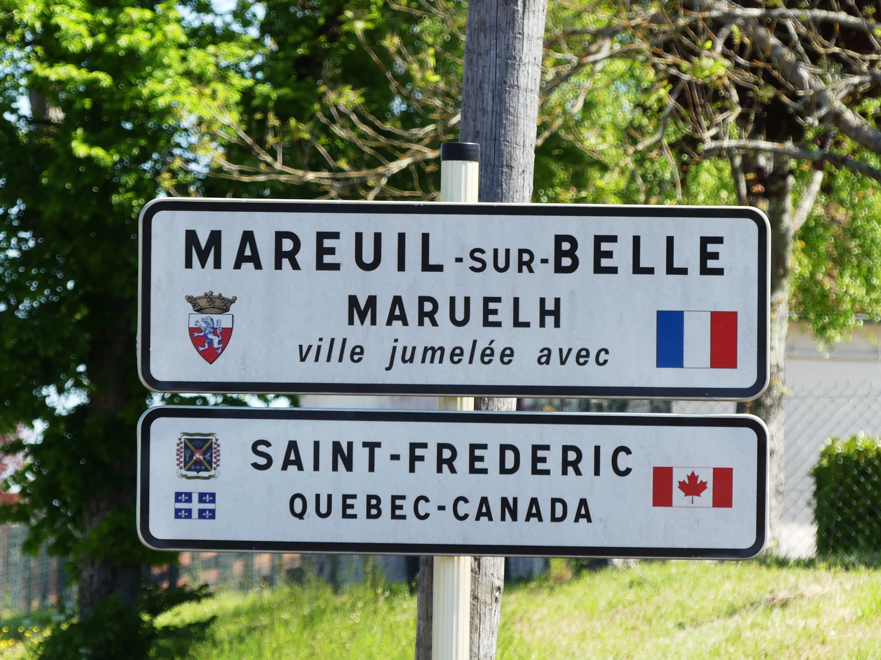 Panneau de jumelage à Mareuil, Dordogne, France.